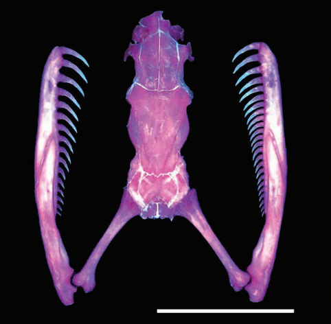 イワサキセダカヘビの骨格標本